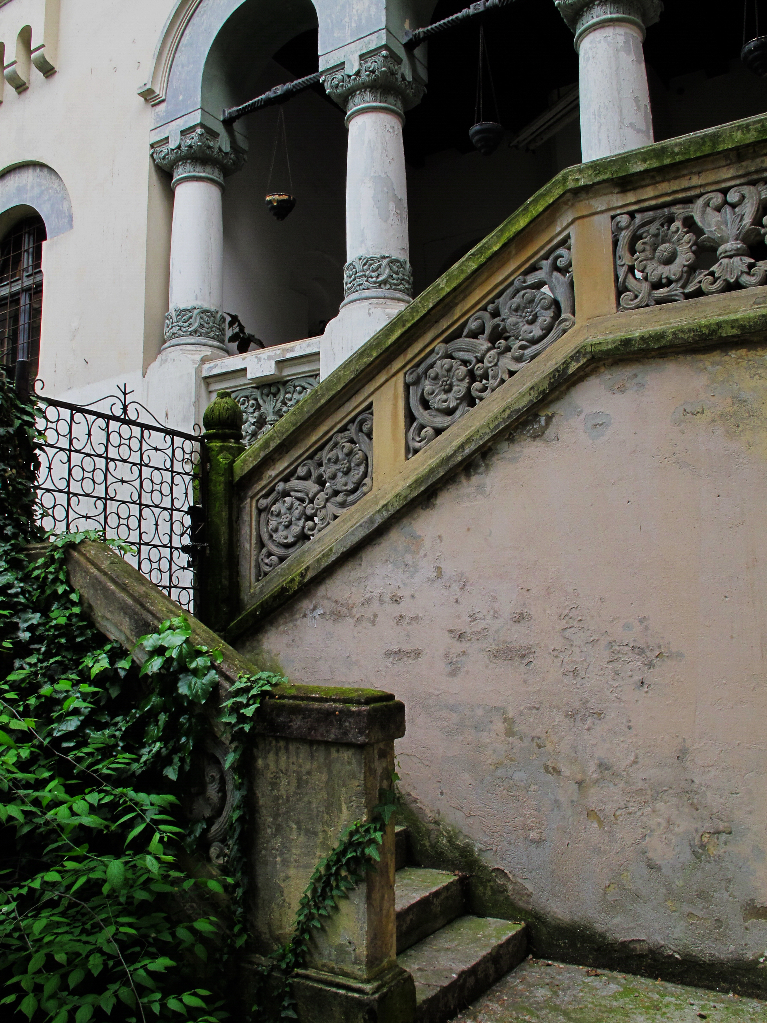 Așezămintele I. C. Brătianu